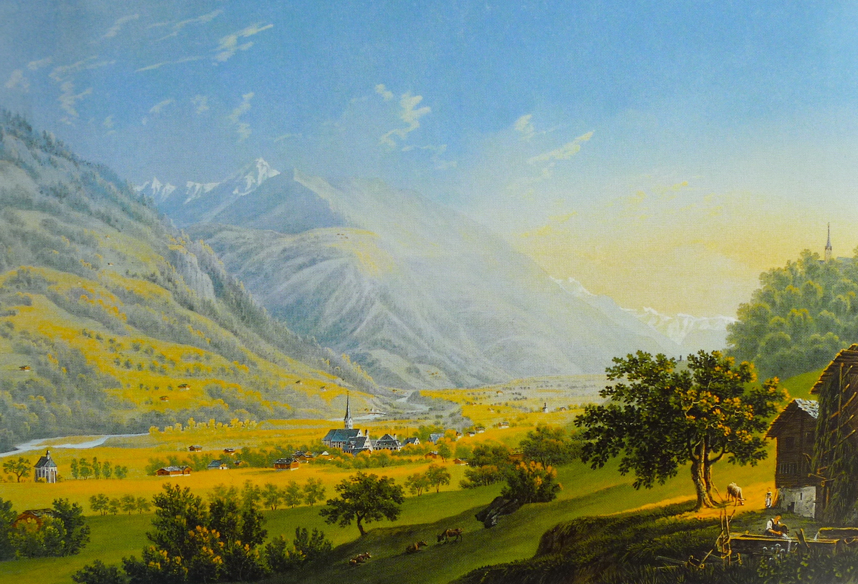 Trun GR von NE, Umrissradierung